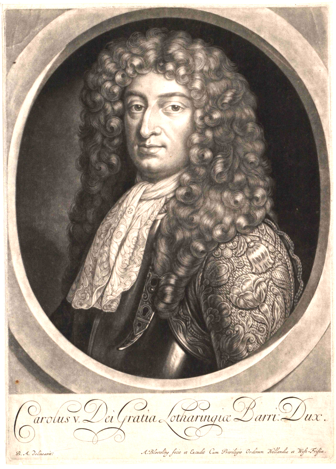 Charles V, Duke of Lorraine